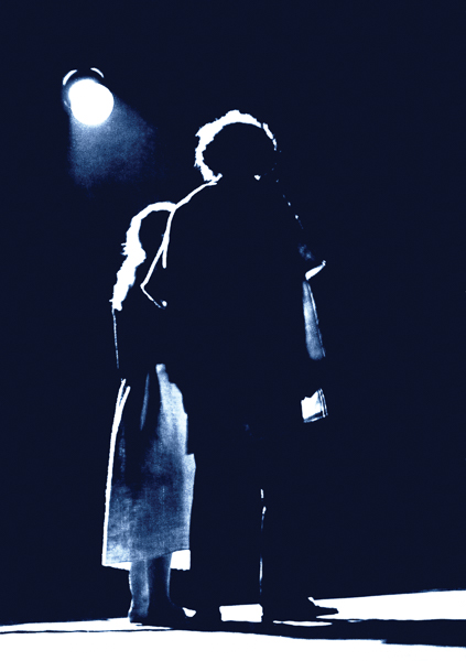 Photo de représentation